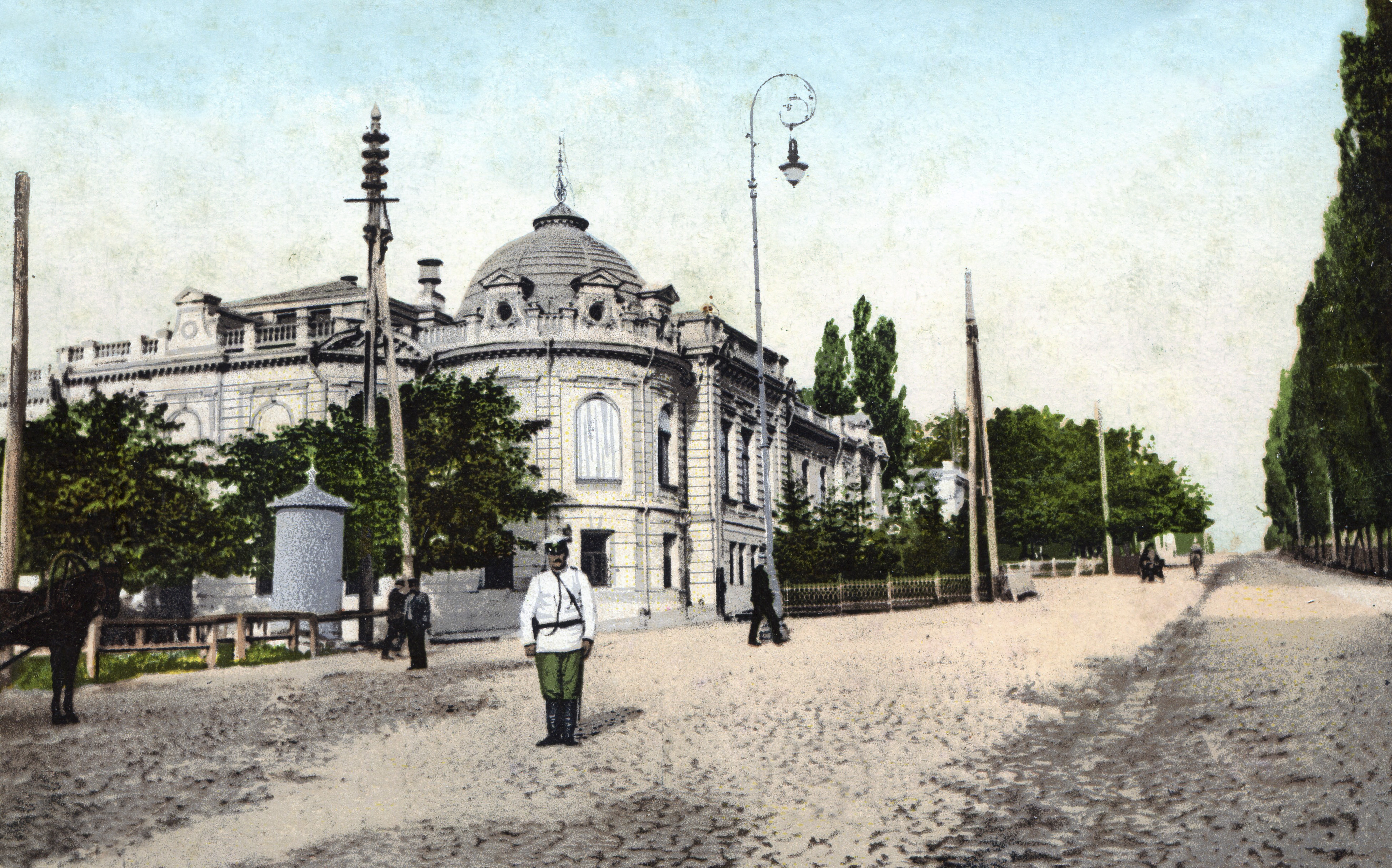 Особняк Терещенка (Республіканська медична бібліотека), Київ, вул. Л. Толстого, 7/2